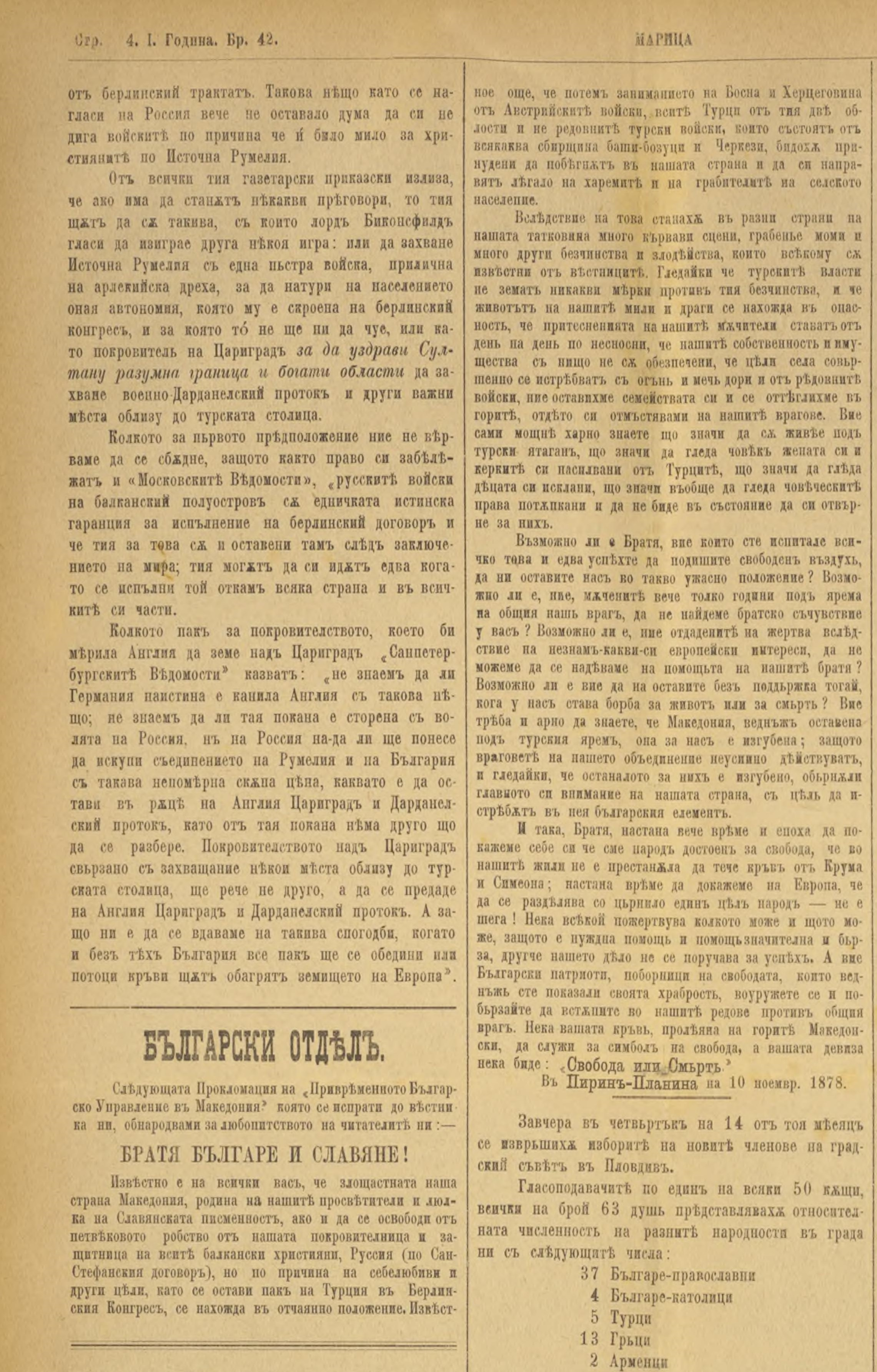 Вестник „Марица“.